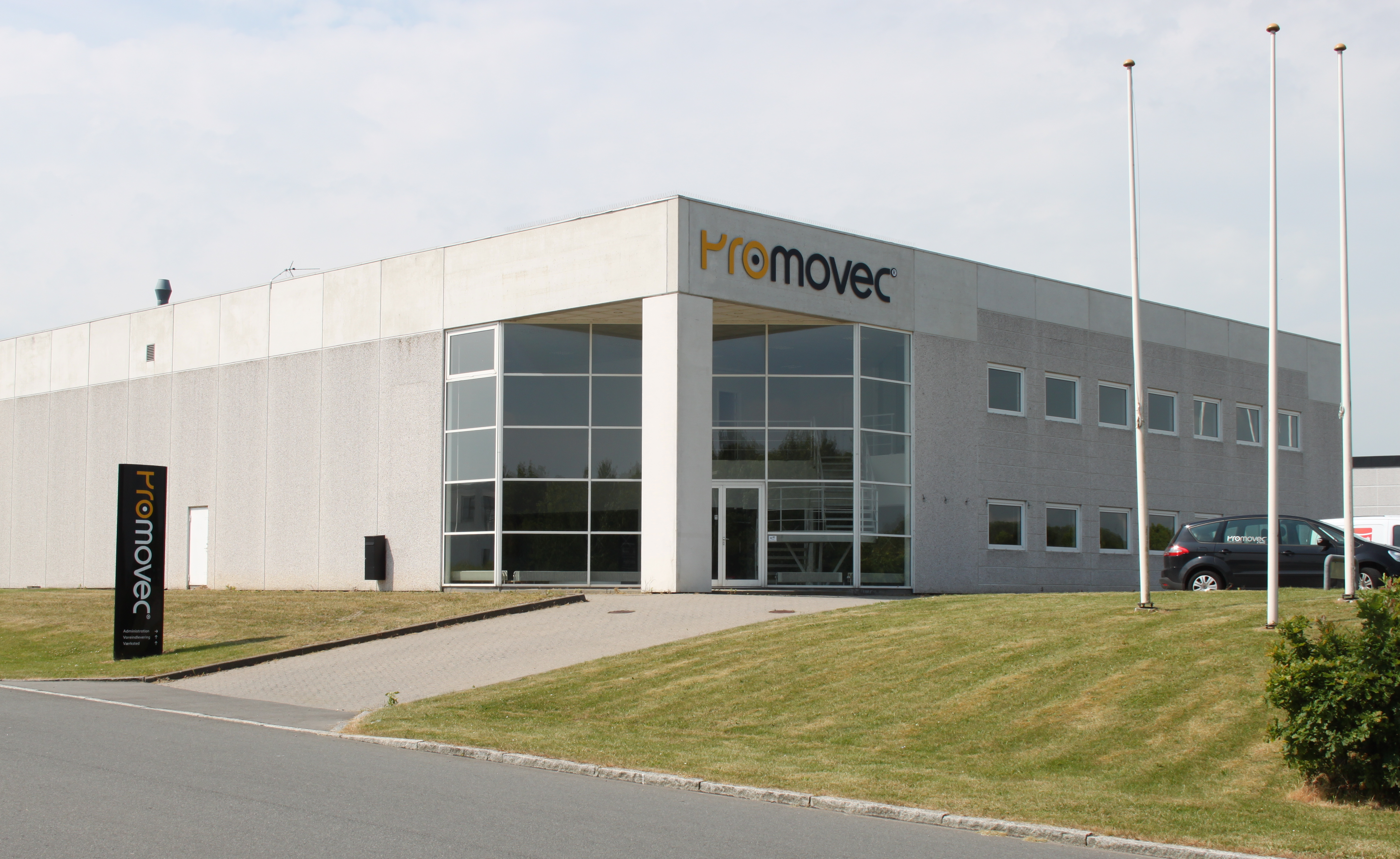 Pro-Movec's headquarter in Aarhus (Risskov), Denmark